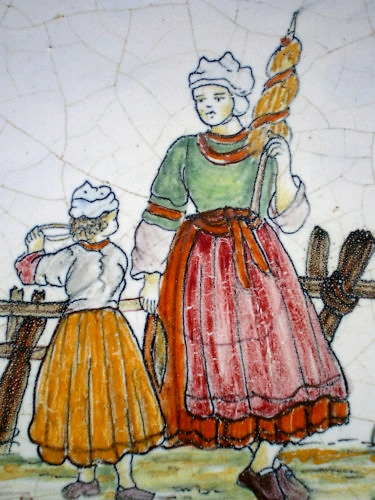 Détail de décor par Béatrix Pouplard, Malicorne, France